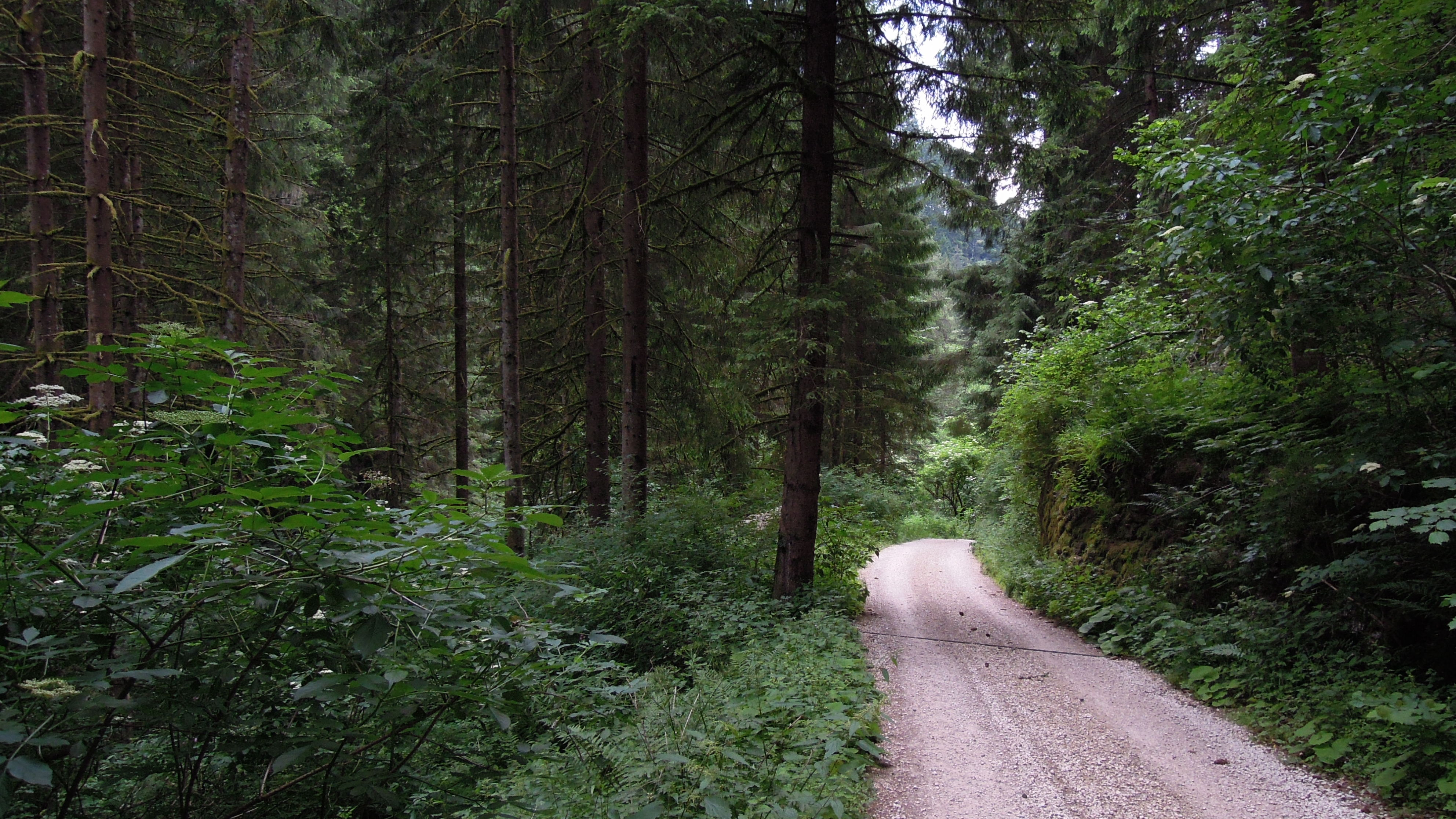 Brantentalschlucht im Gemeindegebiet von Deutschnofen in Richtung Leifers